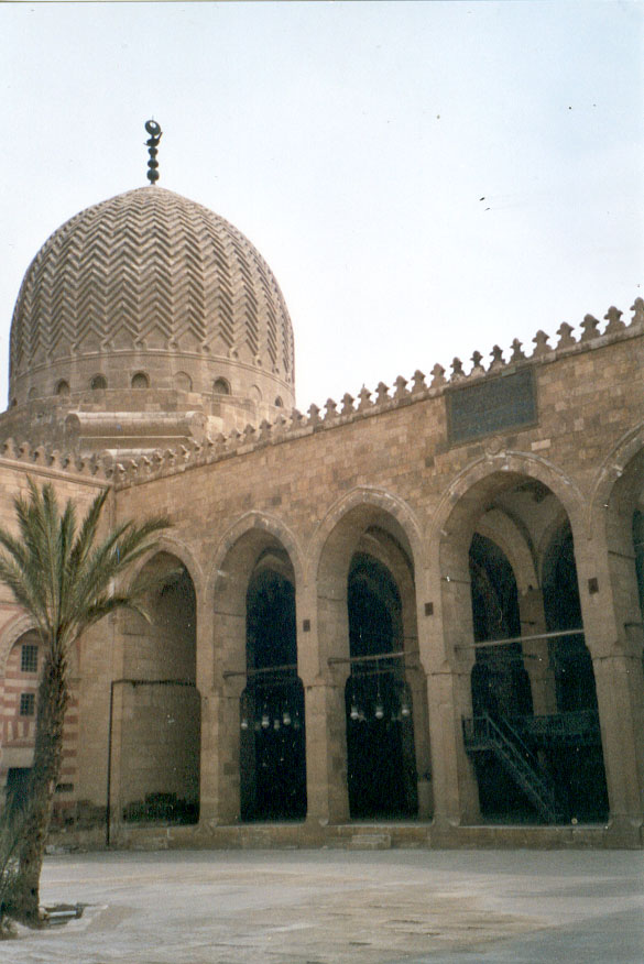 Le Caire : Dans la cours du Mausolée du sultan Mamelouk An-Nasir Faraj ben Barquq (1399-1412) construit en 1411. Dôme contenant la tombe du Sultan. Un dôme symétrique contient celle de son épouse.